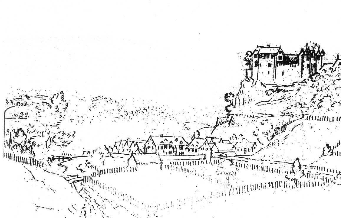 Ansicht von Bilstein auf einer Federzeichung im 18. Jahrhundert.